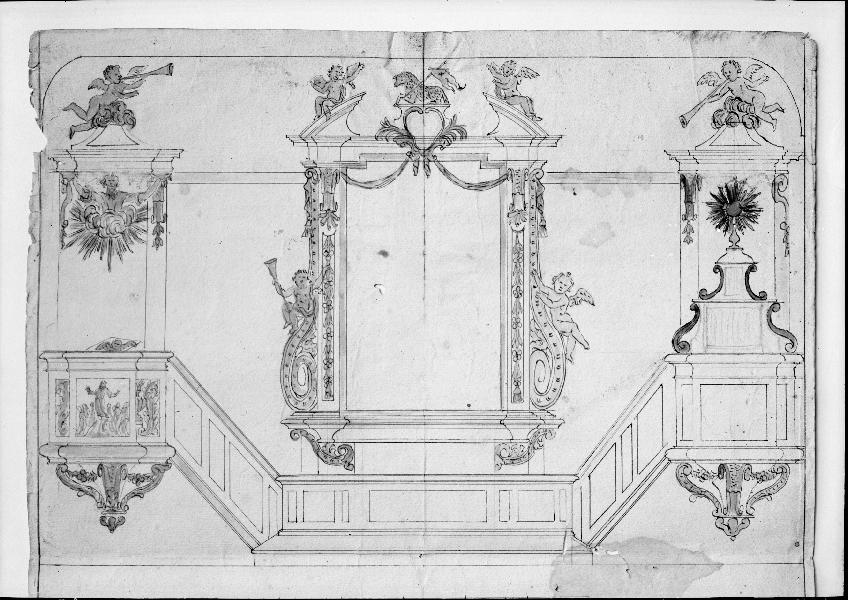 Planritning, koret mot nord: predikstol, altaruppsats, orgel. Eichhorns samling, Kungliga Biblioteket. Kategori: (02) Interiörer, detaljerPlanritning, koret mot nord: predikstol, altaruppsats, orgel. Eichhorns samling, Kungliga Biblioteket.